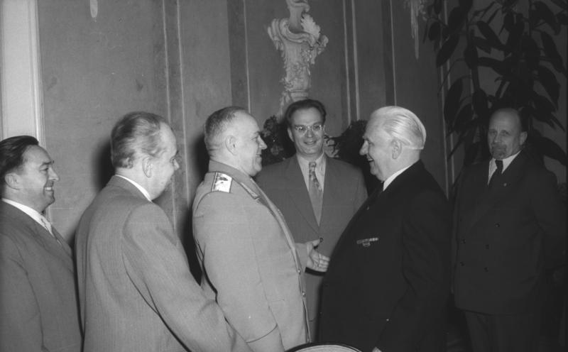 Zentralbild/Heilig 6.5.1955 Präsident Pieck empfing die Sowjetische Regierungsdelegation Am 6.5.1955 empfing Präsident Pieck in seinem Amtssitz in Berlin-Niederschönhausen die Sowjetische Regierungsdelegation, die zu den Feierlichkeiten des 10. Jahrestages der Befreiung des deutschen Volkes vom Faschismus durch die Sowjetarmee am 8.5.1955 in Berlin eintraf. (Näheres siehe ADN-Meldung vom 6.5.1955) UBz: Präsident Pieck im Gespräch mit dem Minister für Verteidigung der UdSSR, Marschall der Sowjetunion, G.K. Shukow. (Mitte) der Leiter der Delegation der 1. Stellvertreter des Vorsitzenden des Ministerrates der UdSSR und Mitglied des Präsidiums des Zentralkomitees der KPdSU, M.G. Perwuchin und (links) der Sekretär des Präsidiums des Obersten Sowjets der UdSSR, N.M. Pegow.